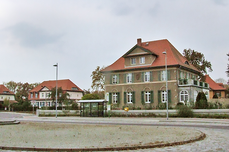 Das 1. Wohngebäude in Kirchmöser-West von 1916